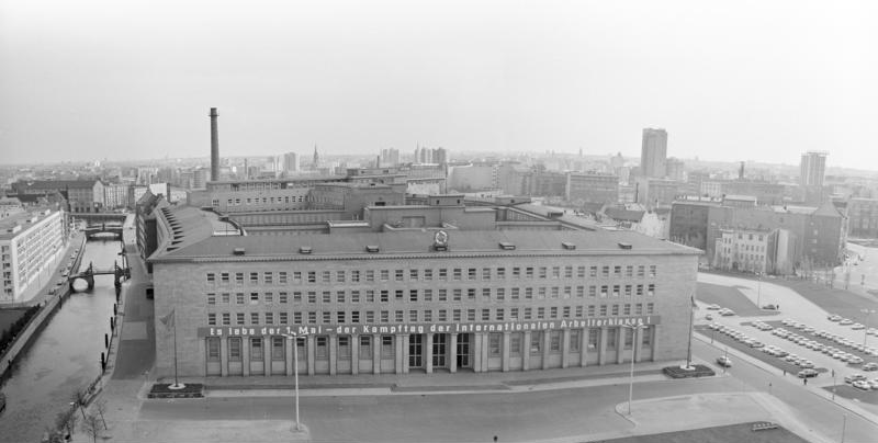 Zentralbild/Koard 27.4.1967 Berlin: Das Gebäude des ZK der SED am Marx-Engels-Platz Zweiteiliges Panorama